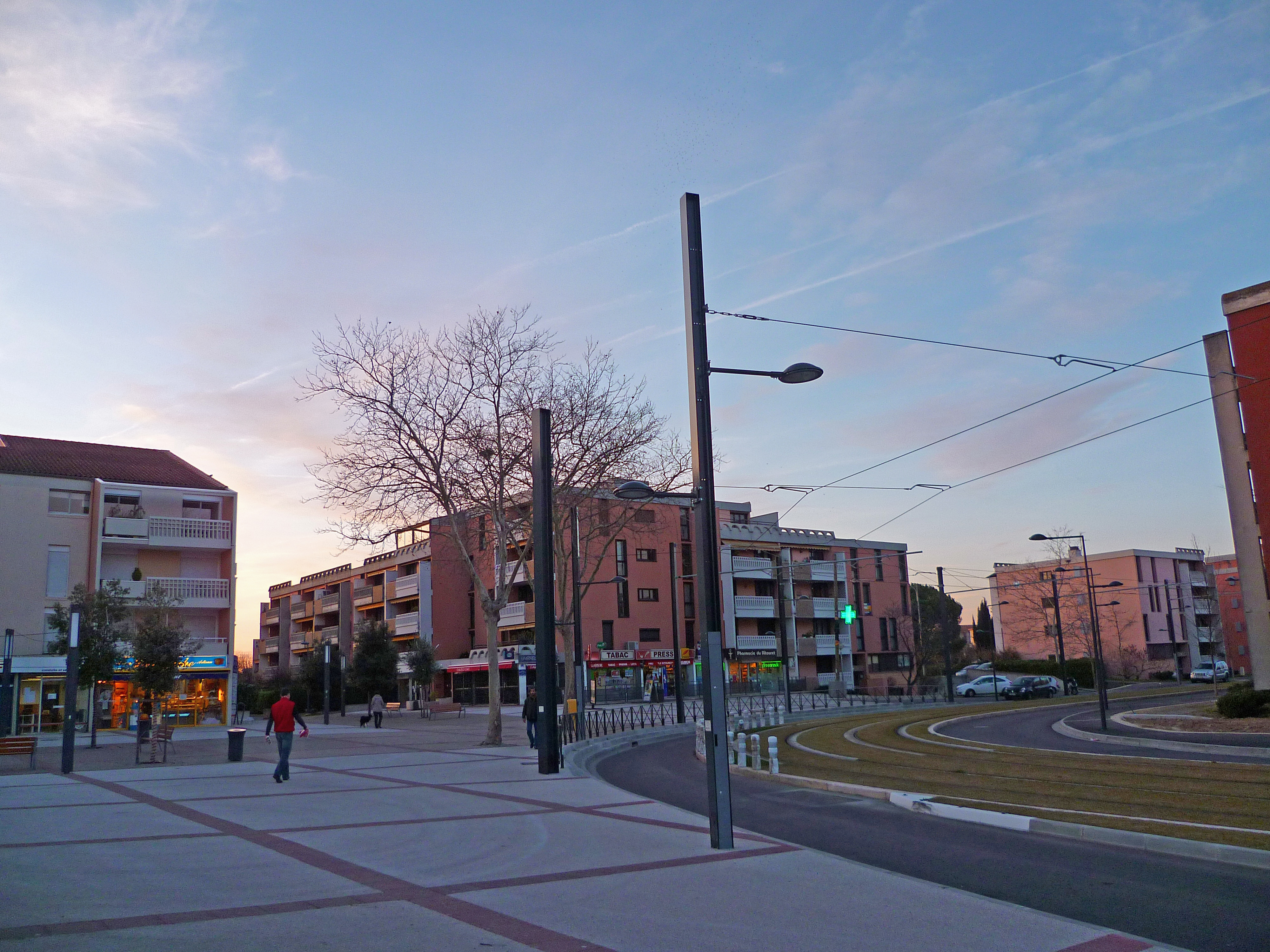 L'avenue des Pins à Blagnac.